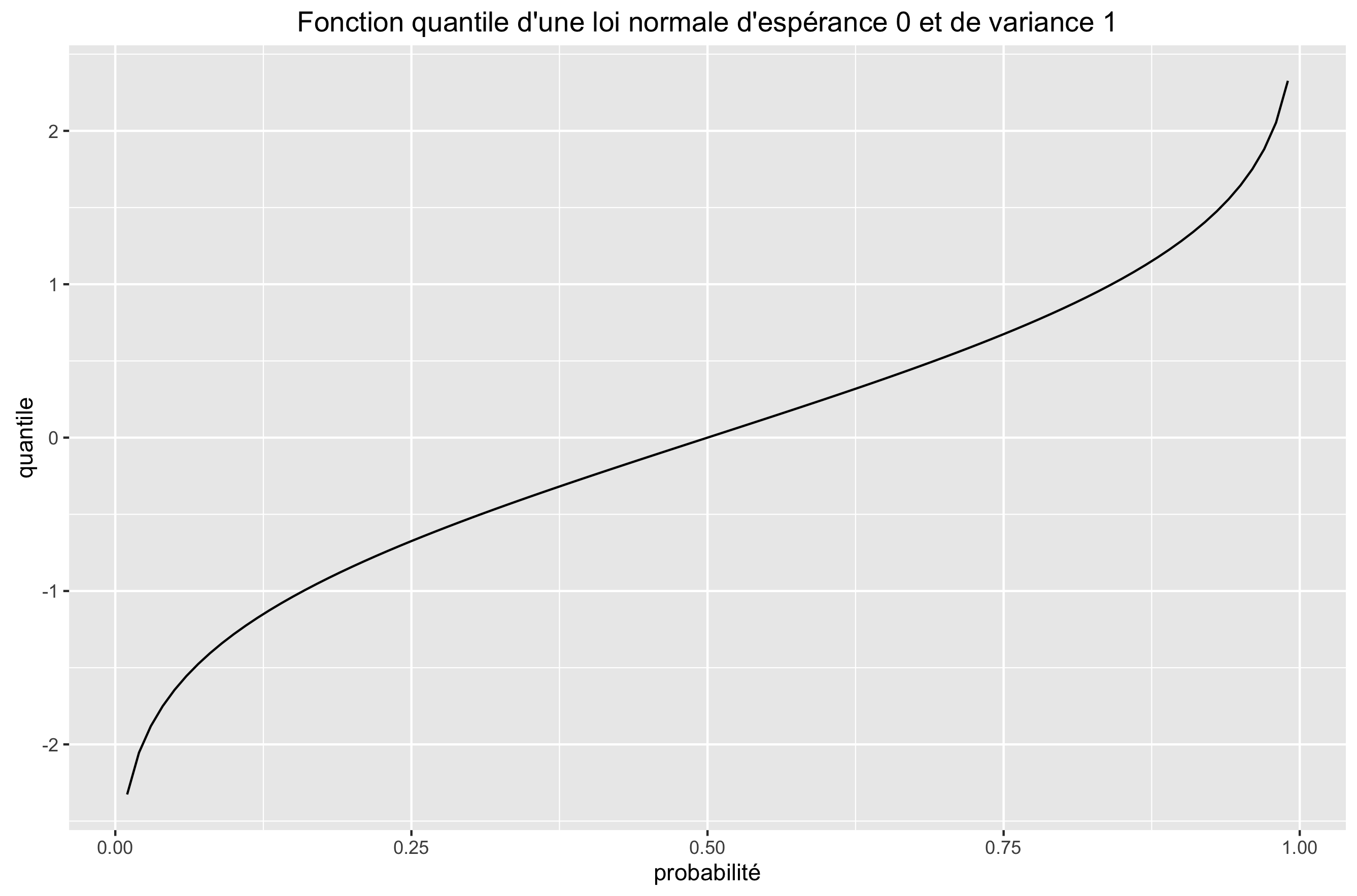 Ce graphique représente la fonction quantile d'une loi normale d'espérance 0 et de variance 1. Il a été réalisé avec le langage R et la librairie ggplot2